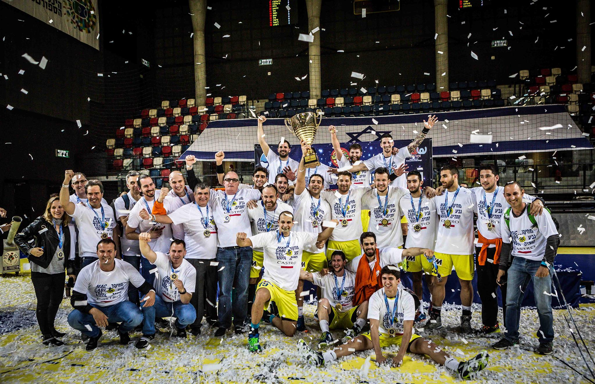 מכבי תל אביב כדוריד, מחזיקת גביע המדינה לעונת 2017